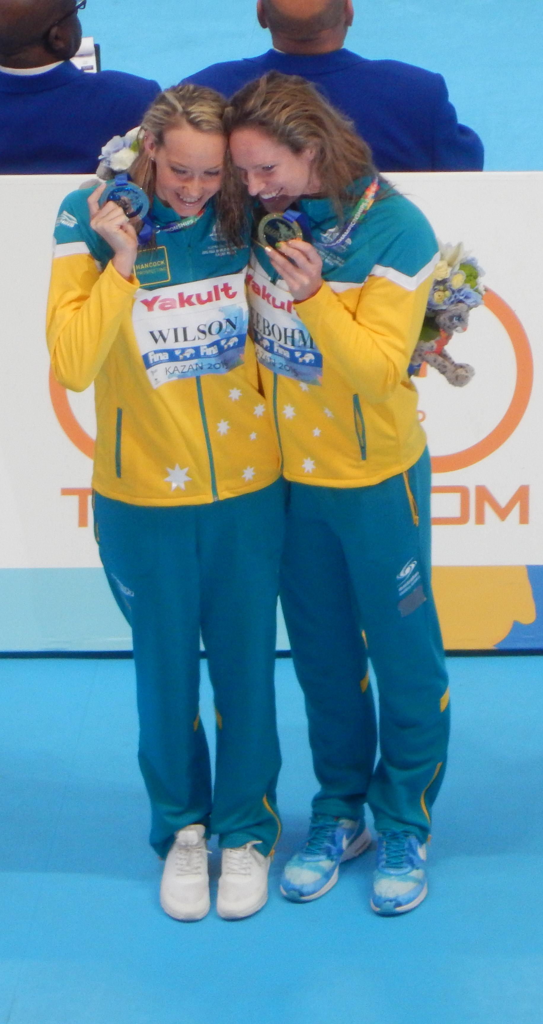 Эмили Сибом и Мэдисон Уилсон после триумфа на дистанции 100 метров на спине в Казани